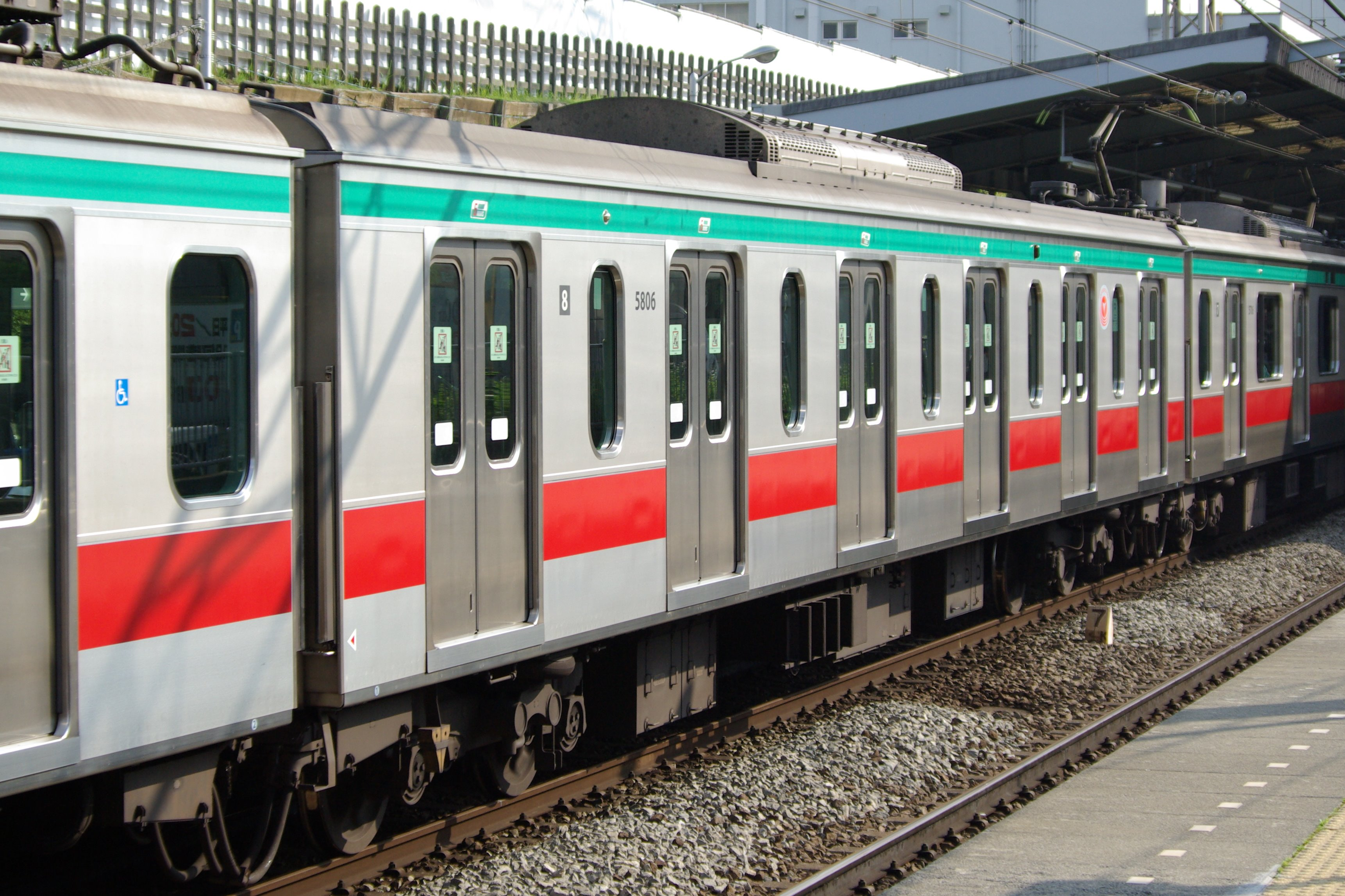 東急5000系6扉車（5806号）